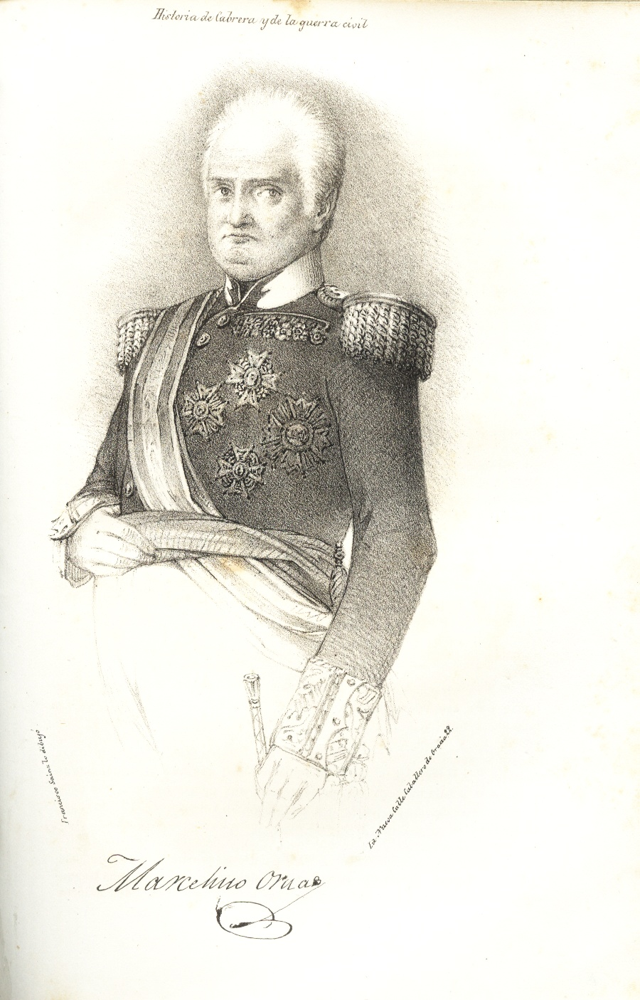 Marcelino Oraa. Dámaso Calbo y Rochina de Castro. "Historia de Cabrera". Madrid 1845